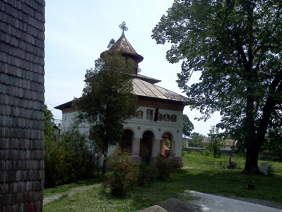 Biserica „Sf. Nicolae”